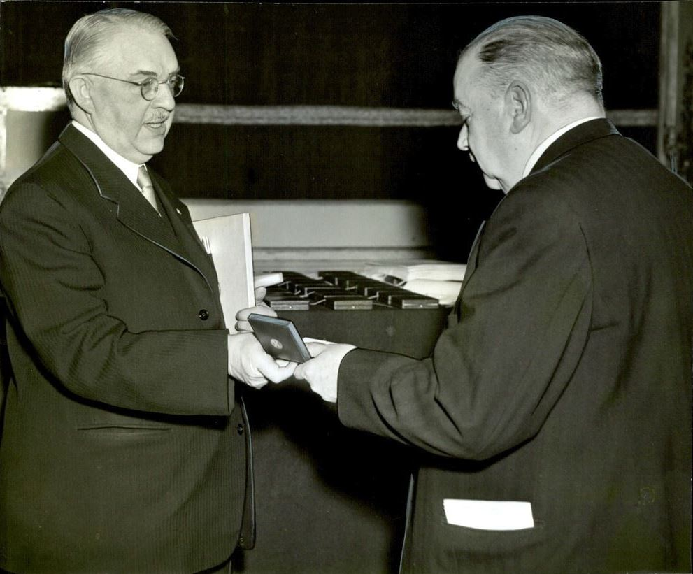 Landshövding Hilding Kjellman (1885-1953) överlämnar en guldmedalj till arkitekt John Åkerlund (1884-1961) för hans insatser inom hembygdsvården (1952).